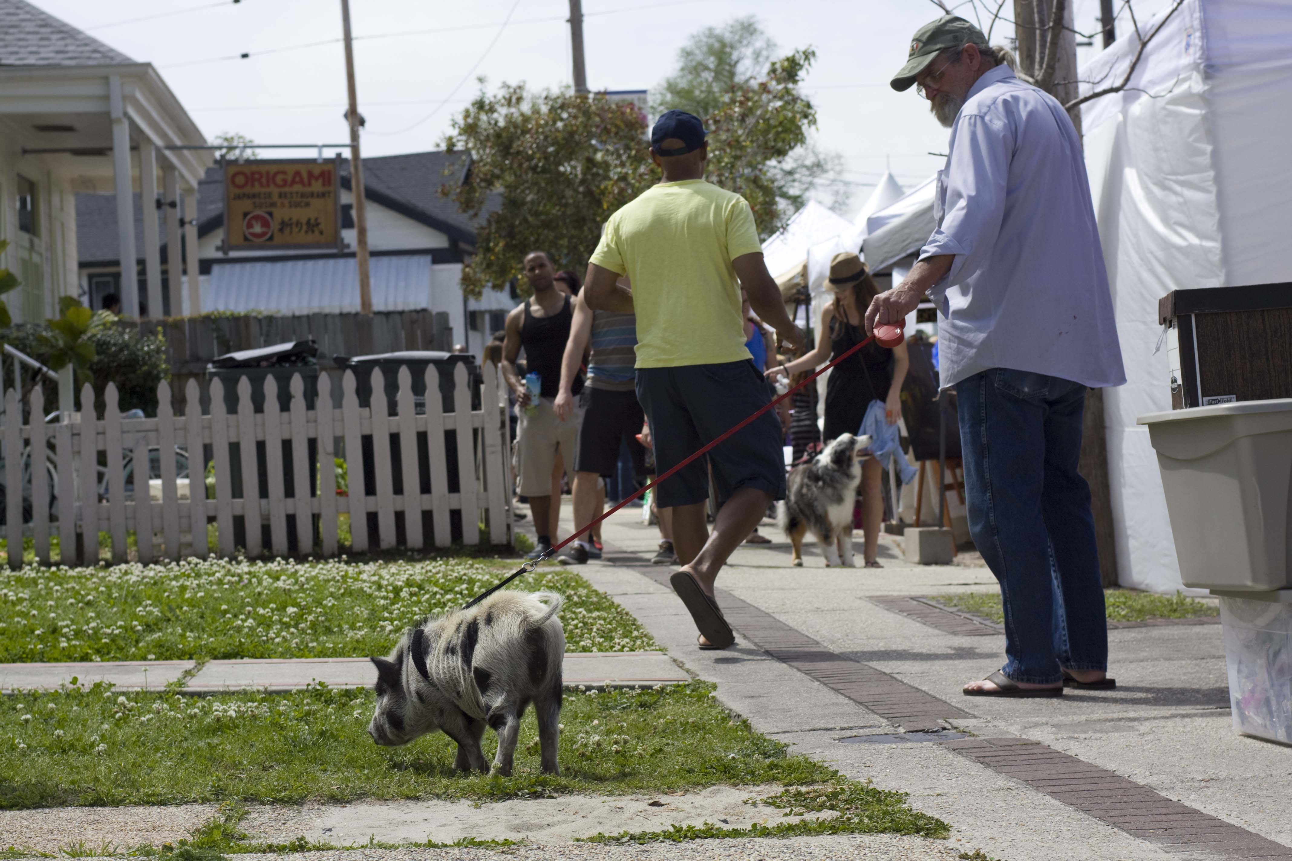 "Freret Street Festival" - walking pet pig. Freret Street, Uptown New Orleans.